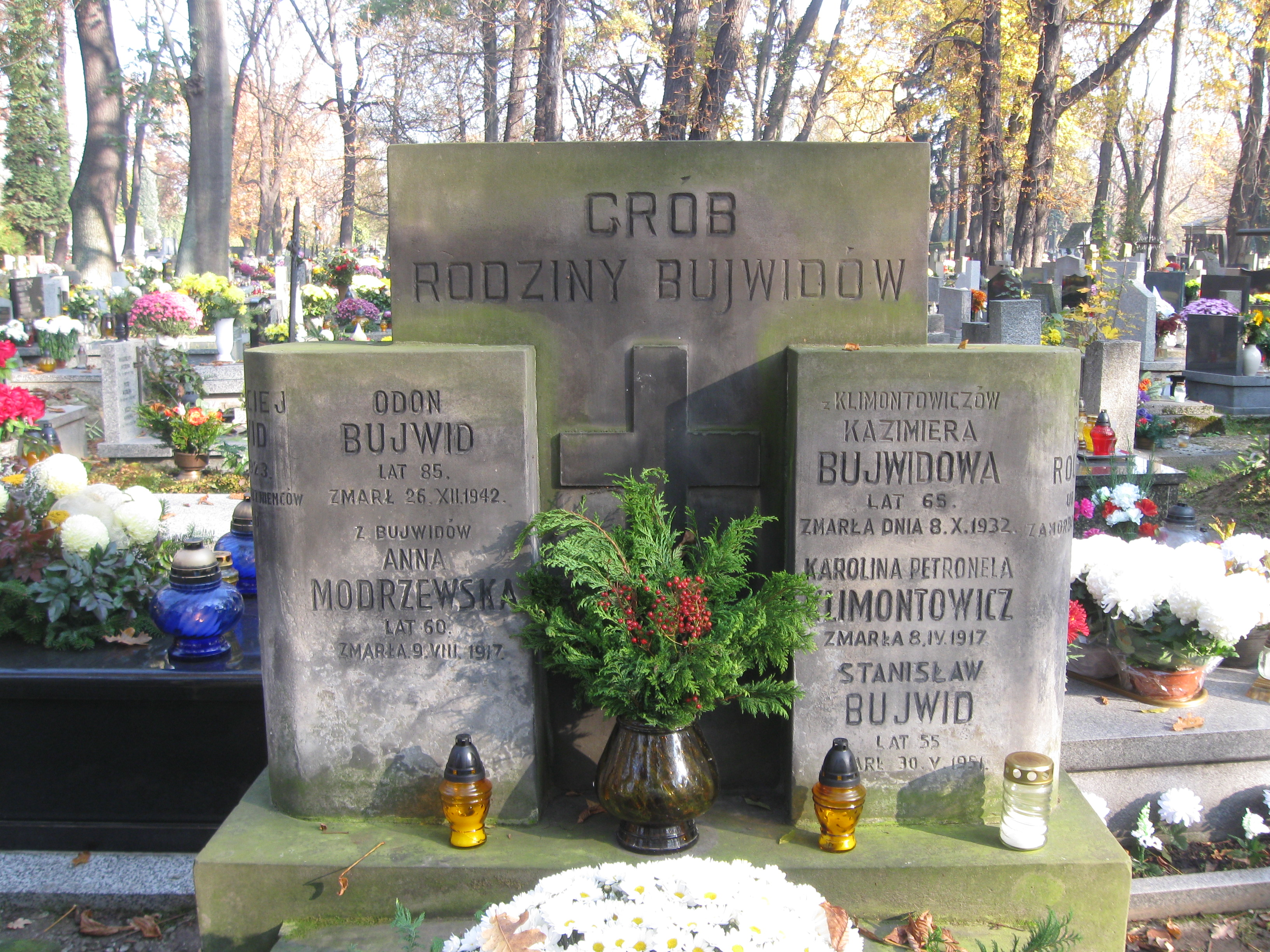 Grobowiec Odona i Kazimiery Bujwidów na Cmentarzu Rakowickim w Krakowie.